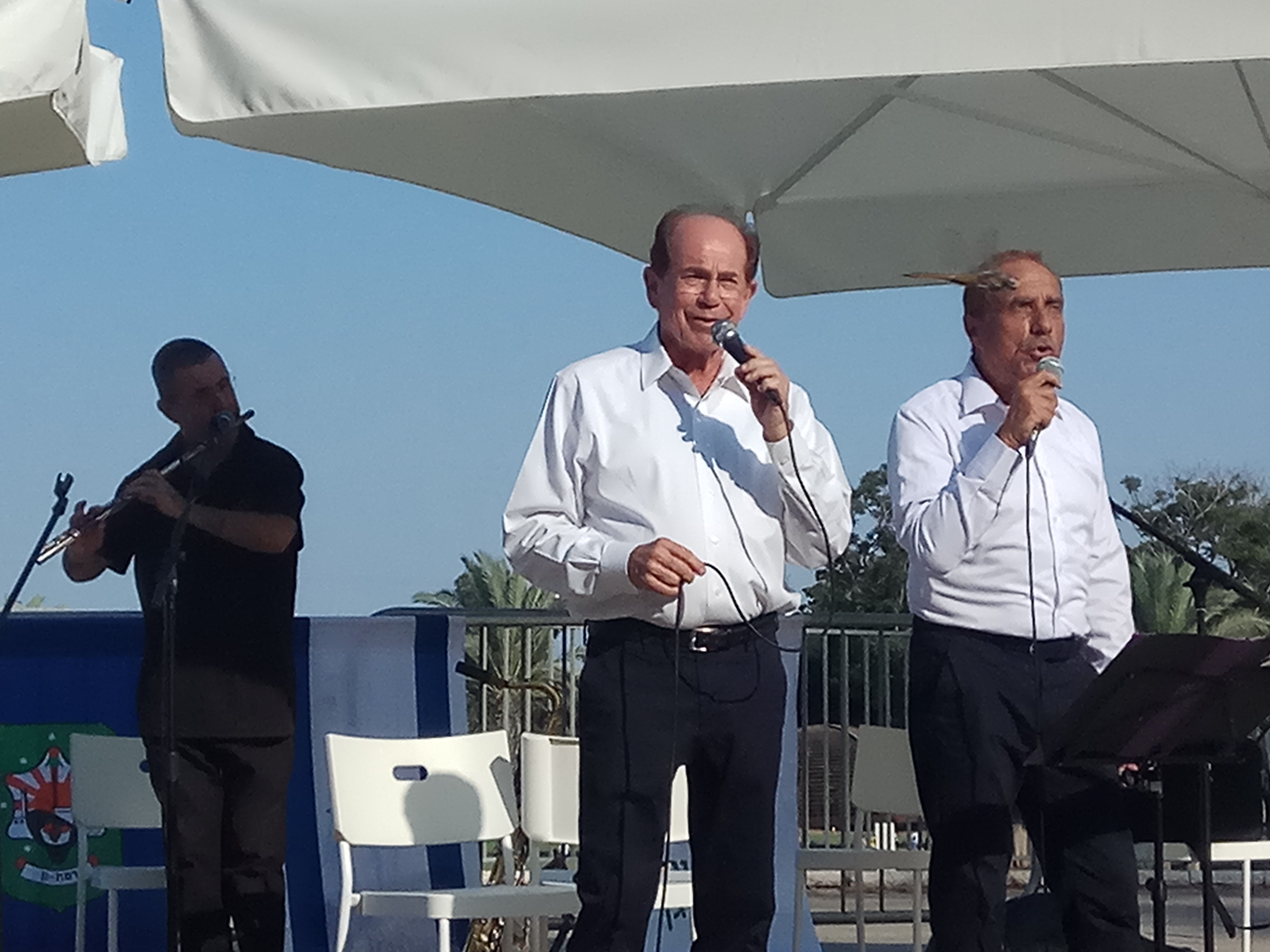 צמד רעים בהופעה בפארק הלאומי ברמת גן